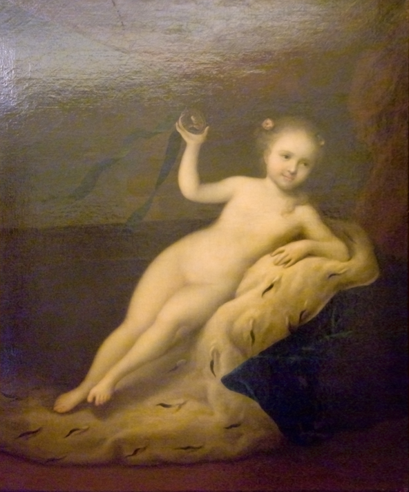 Будущая императрица Елизавета Петровна, дочь Петра I и Екатерины I, изображена обнаженной в образе Флоры (?), лежащей на синей, подбитой горностаем мантии — знак принадлежности к императорской семье. В правой руке она держит миниатюру с портретом отца - Петра I, к рамке которой прикреплена Андреевская синяя лента. Архитектурный фон составляет нейтральная коричневая драпировка с правой стороны. Есть нечто пикантное в том, что ребенку приданы формы взрослой женщины. Но в это время по законам портретописи детей изображали как взрослых.